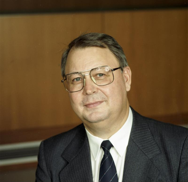 18.12.1989 Klaus Winter, Richter am Bundesverfassungsgericht II. Senat